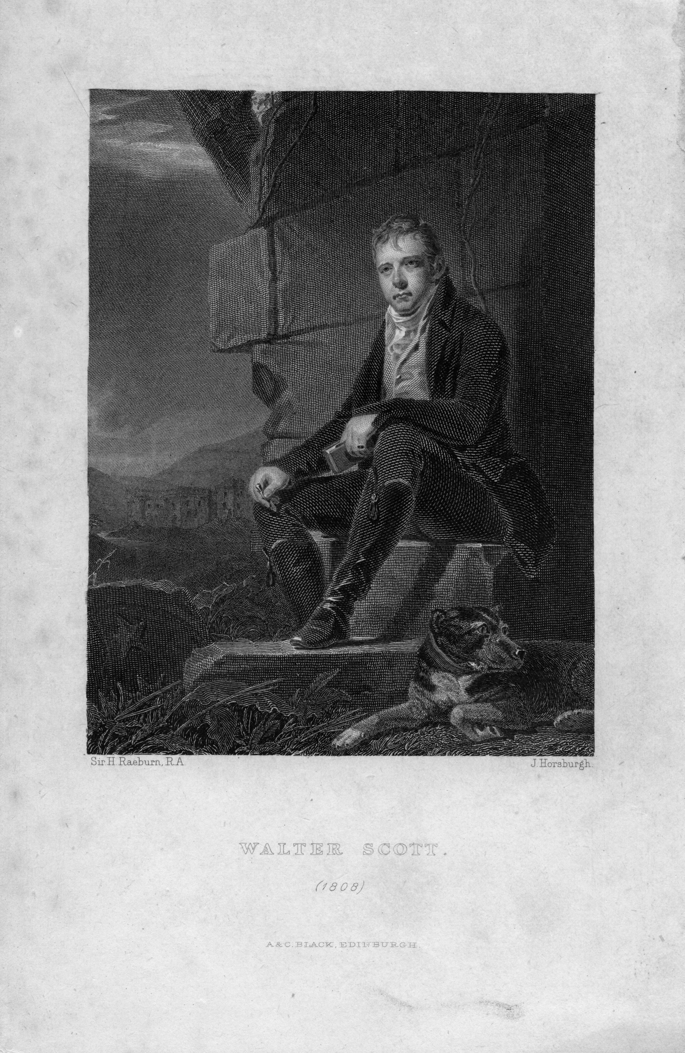 portrait gravé